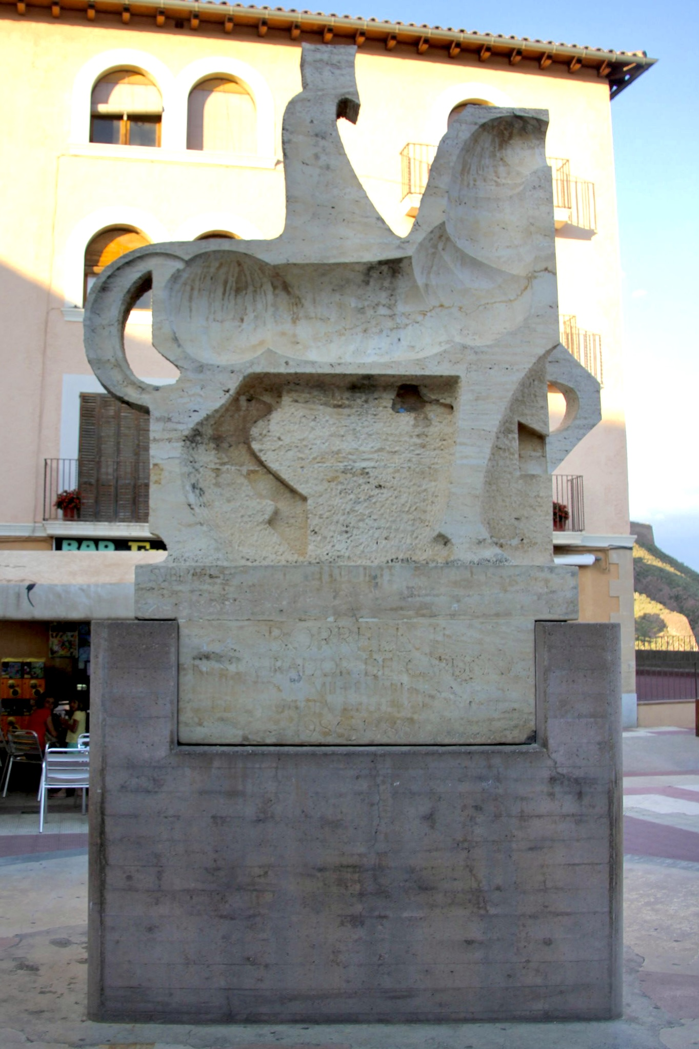 Nucli antic de Cardona